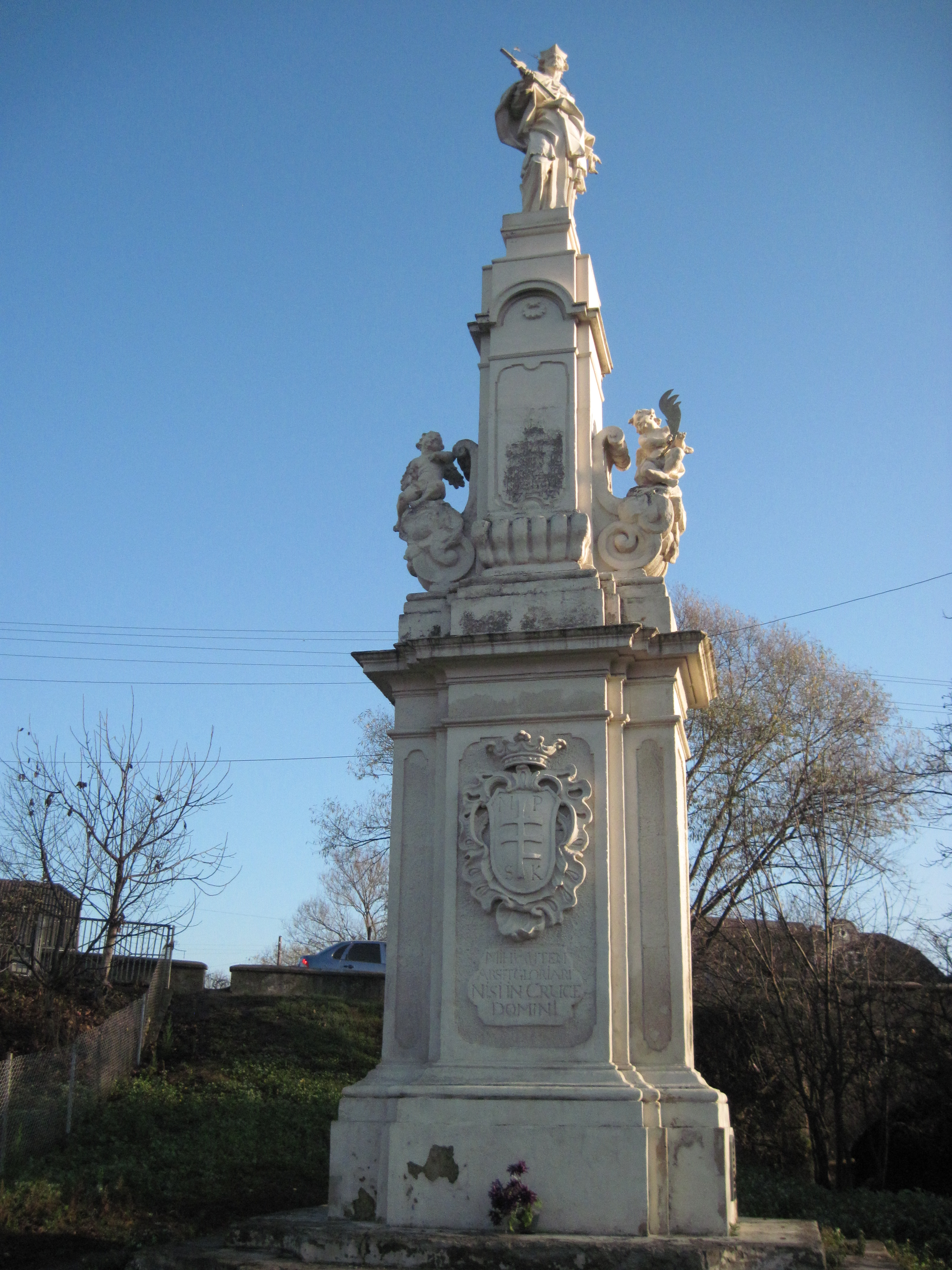 Й.-Г.Пінзель. Святий Ян Непомук. Бучач. осінь 2013 (копія статуї - робота Романа Вільгушинського)